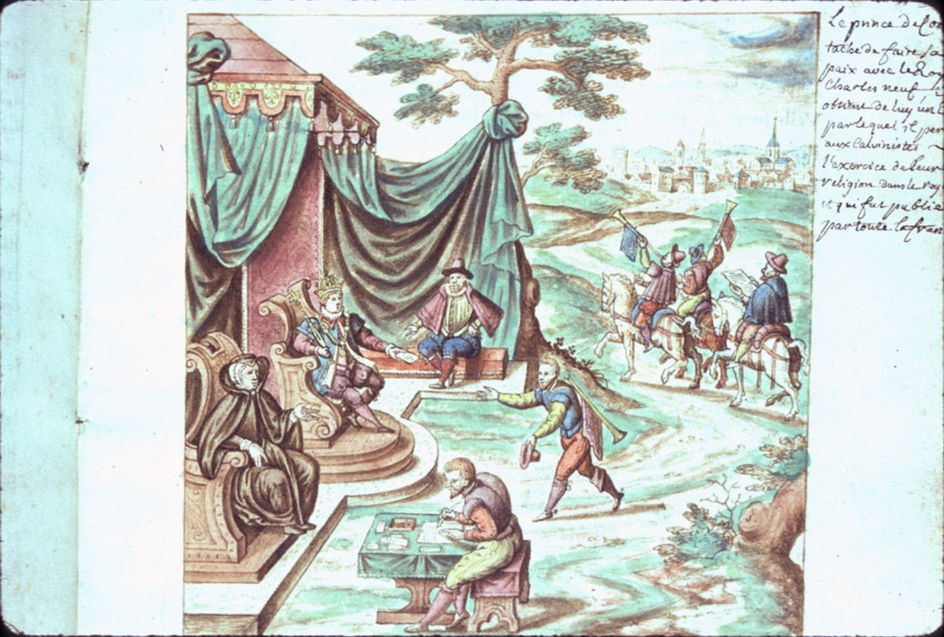 Charles IX et Catherine de Médicis publiant la paix de Saint-Germain (août 1570). Miniature de l'ouvrage Carmen de tristibus Galliae, 1577, Bibliothèque municipale de Lyon, ms. 0156, folio 11.